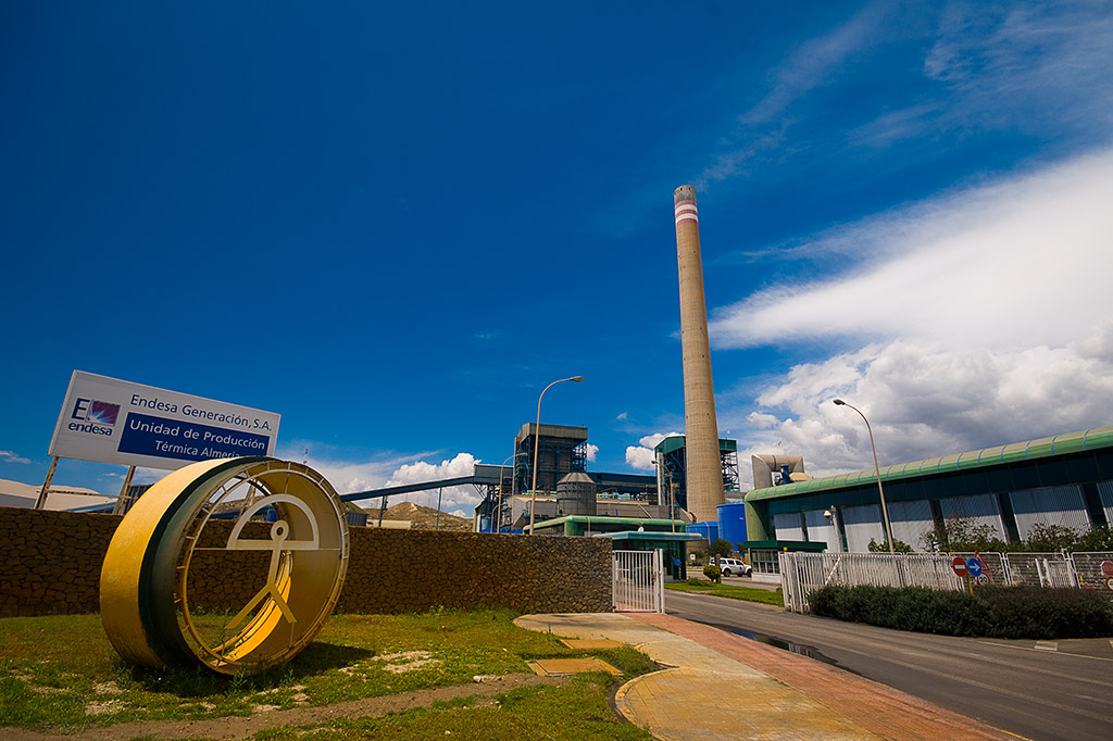 Entrada a la central térmica de Carboneras, Almería (España)